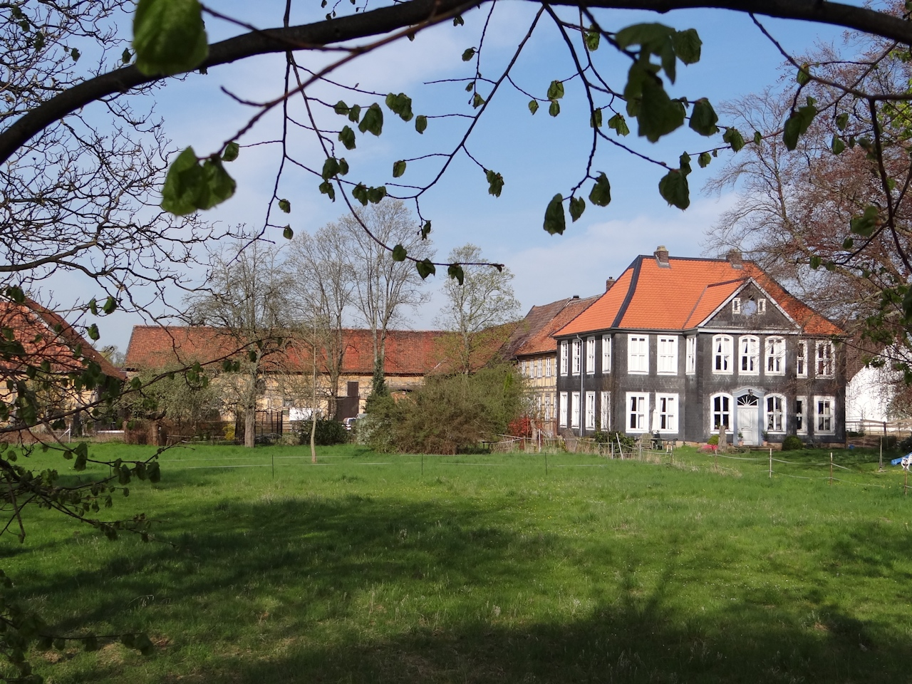 Herrenhaus des Schriftsassenhofs in Stöckheim (Braunschweig) im April 2013